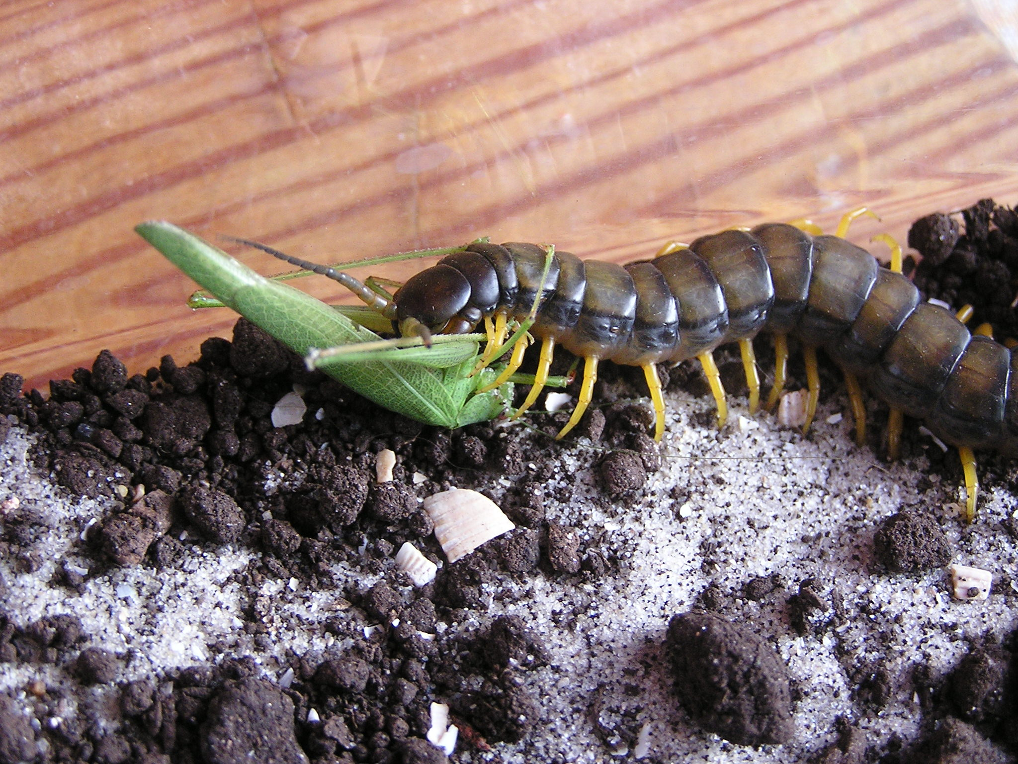 Сколопендра